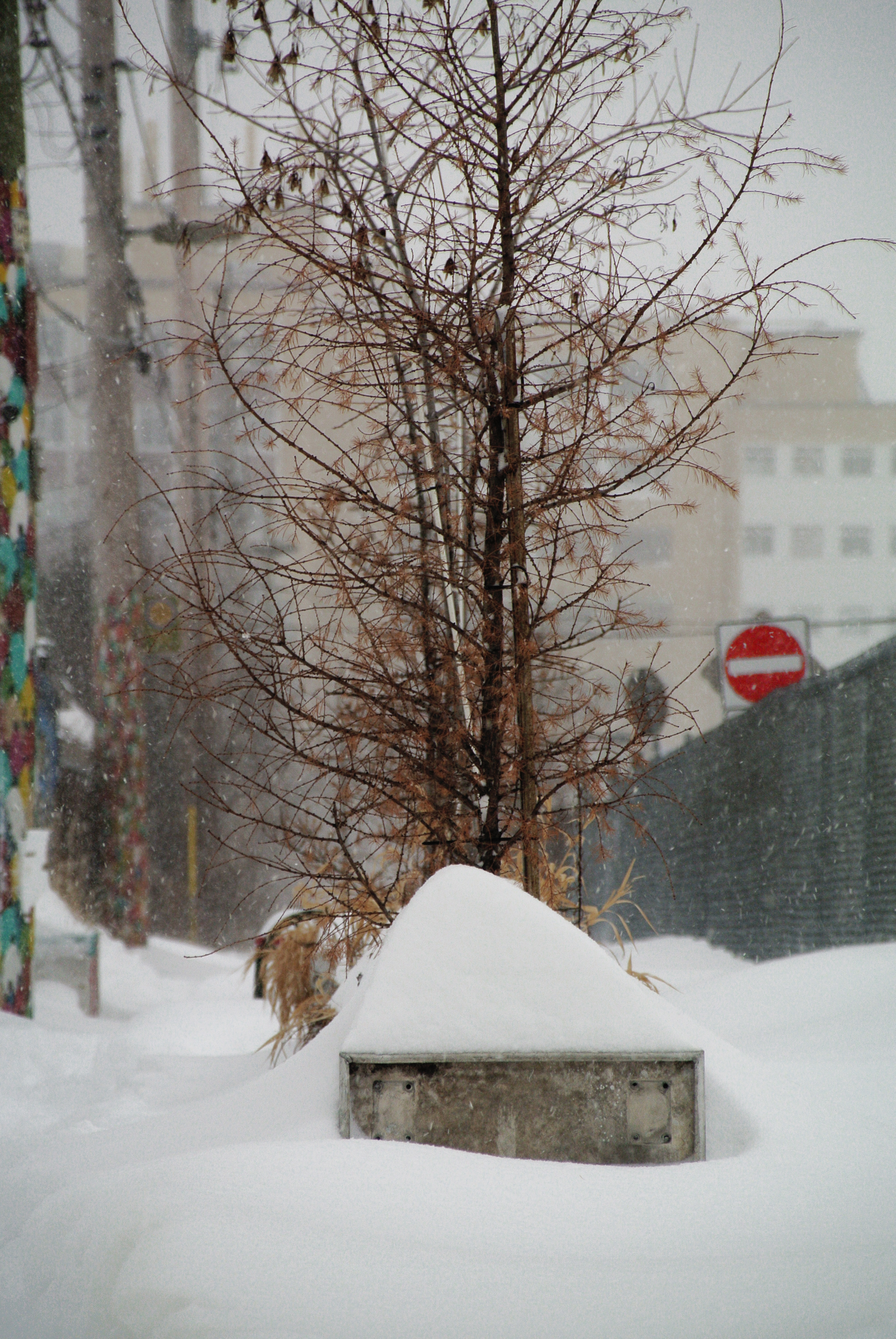 Boites à fleurs en aluminium faite à partir d'anciennes armoires à pain de chez Steinberg.